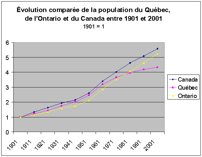 Évolution comparée de la population du Québec, de l'ontario et du Canada entre 1901 et 2001. Basé sur les recensements du Canada. Compilation : Nicolas Gagnon